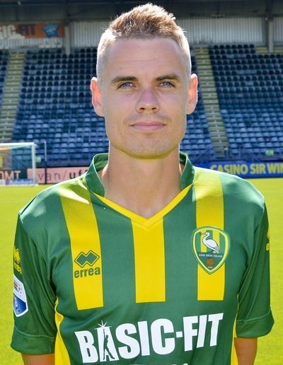 Thomas Kristensen